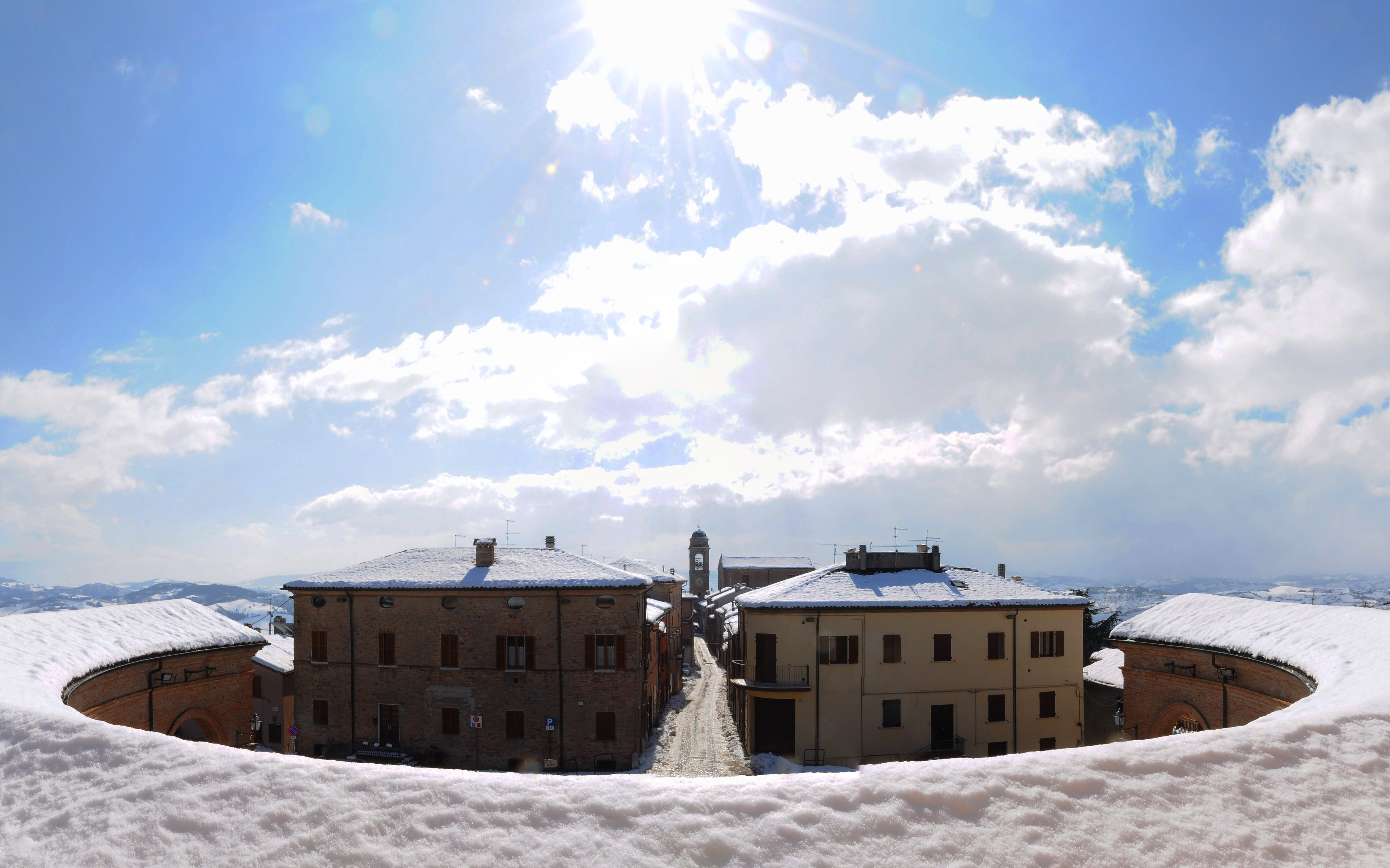 Loggiato del Cresci (Mondaino) This is a photo of a monument which is part of cultural heritage of Italy.